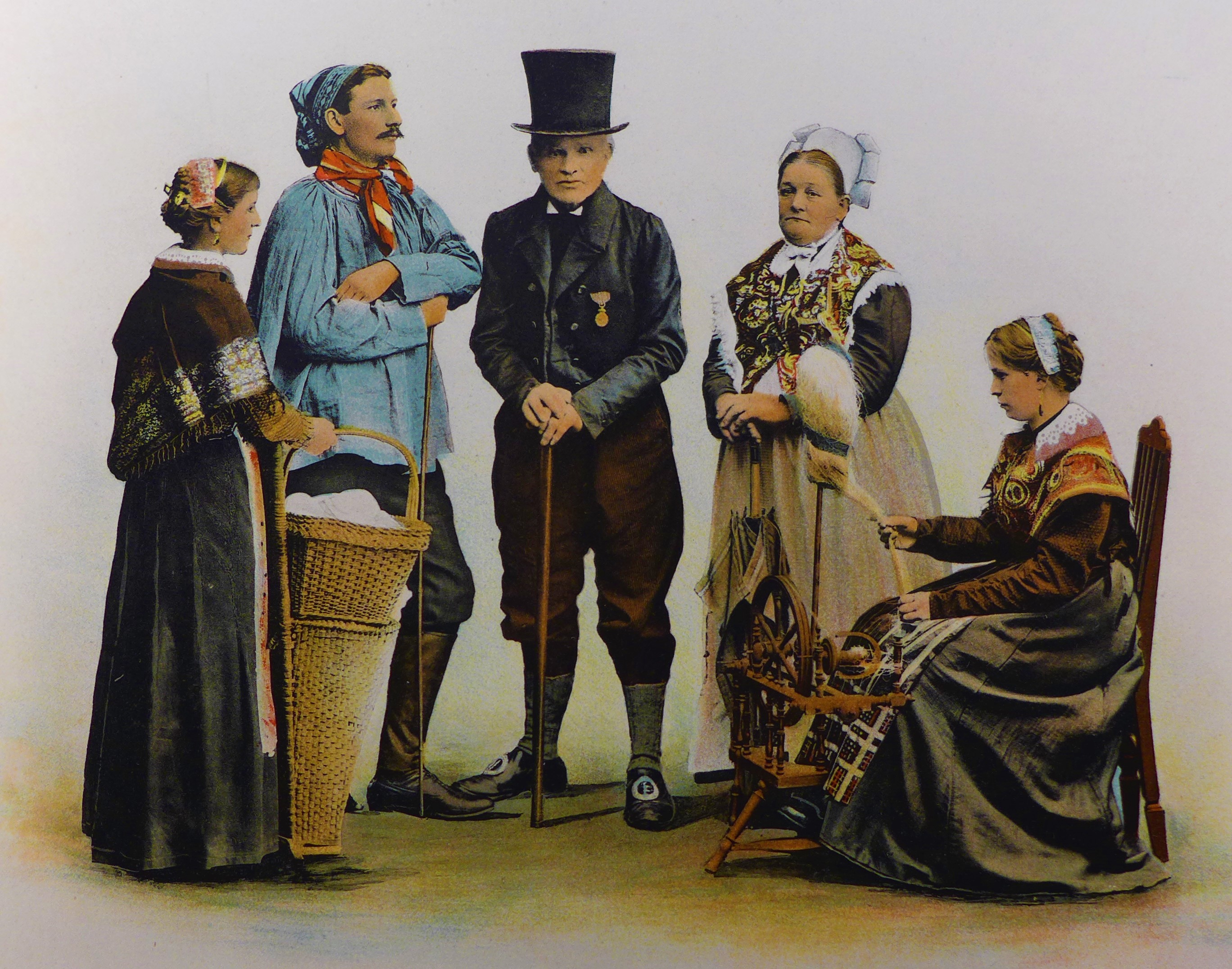 Trachtenrekonstruktionen der Saar-Mosel-Region der Gesellschaft für nützliche Forschungen zu Trier aus dem Jahr 1901 (Franz von Pelser-Berensberg: Altrheinisches, Mitteilungen über Trachten, Hausrat, Wohn- und Lebensweise im Rheinland, Düsseldorf 1909.)